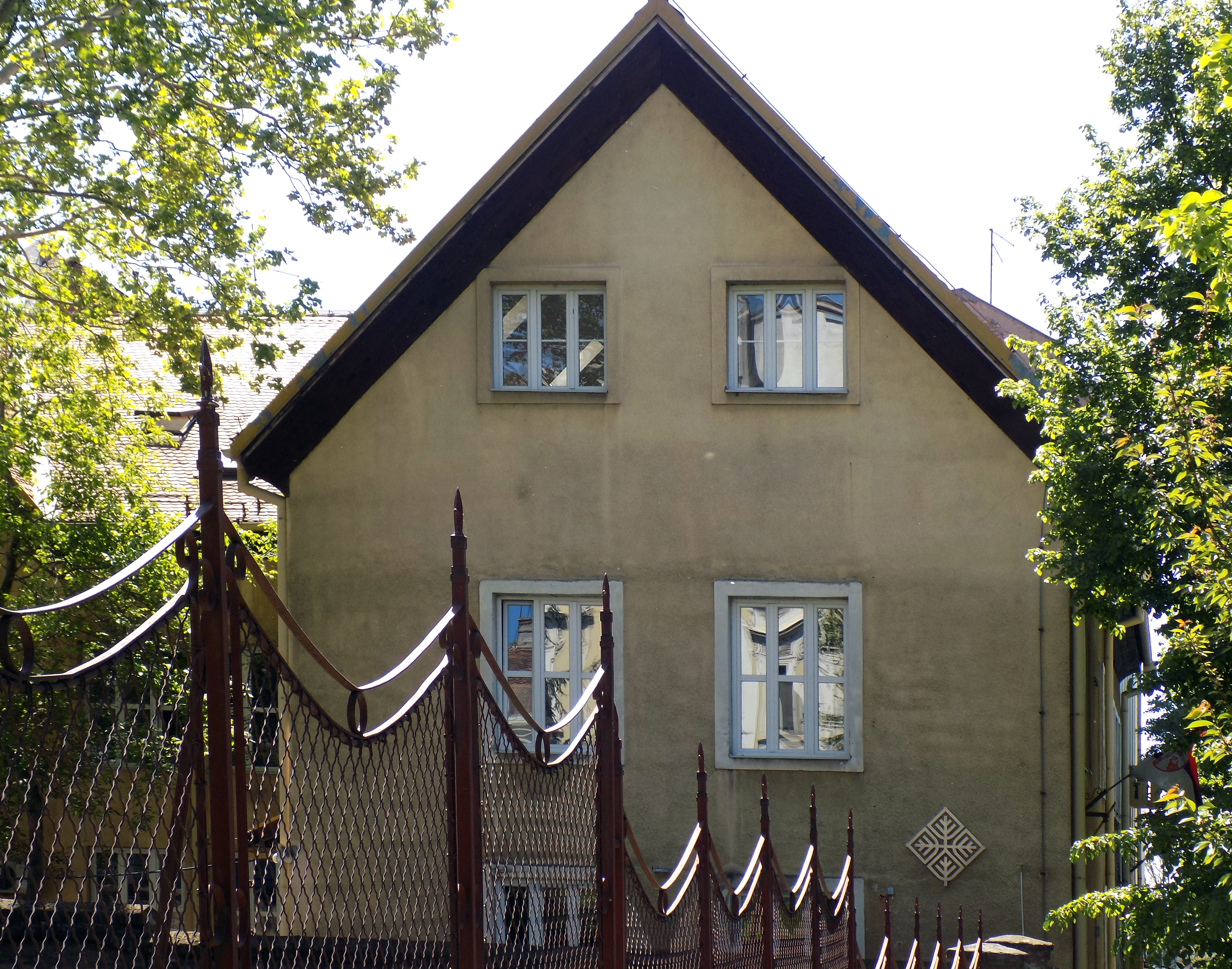 Zgrada umetničke skole u Beogradu u kojoj se danas nalazi Fakultet primenjenih umetnosti Univerziteta umetnosti u Beogradu